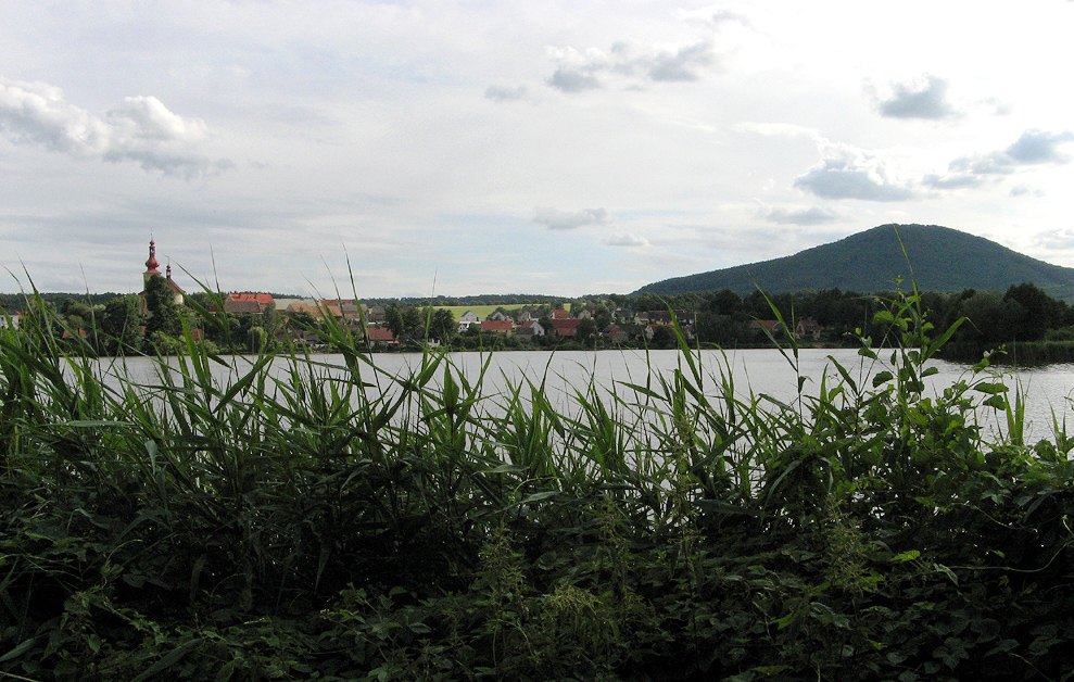 Výlet na Vlhošť a Ronov 24. 6. 2007